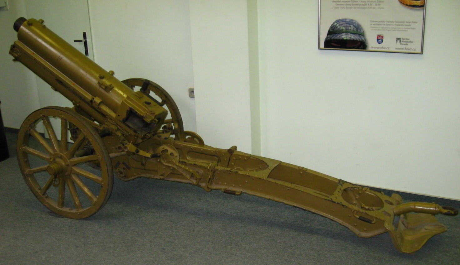 Брдски топ 75 mm Шкода М.28, изложен у Armádní muzeum, Праг, Чешка Република. Снимио: Mice, 26.03.2009